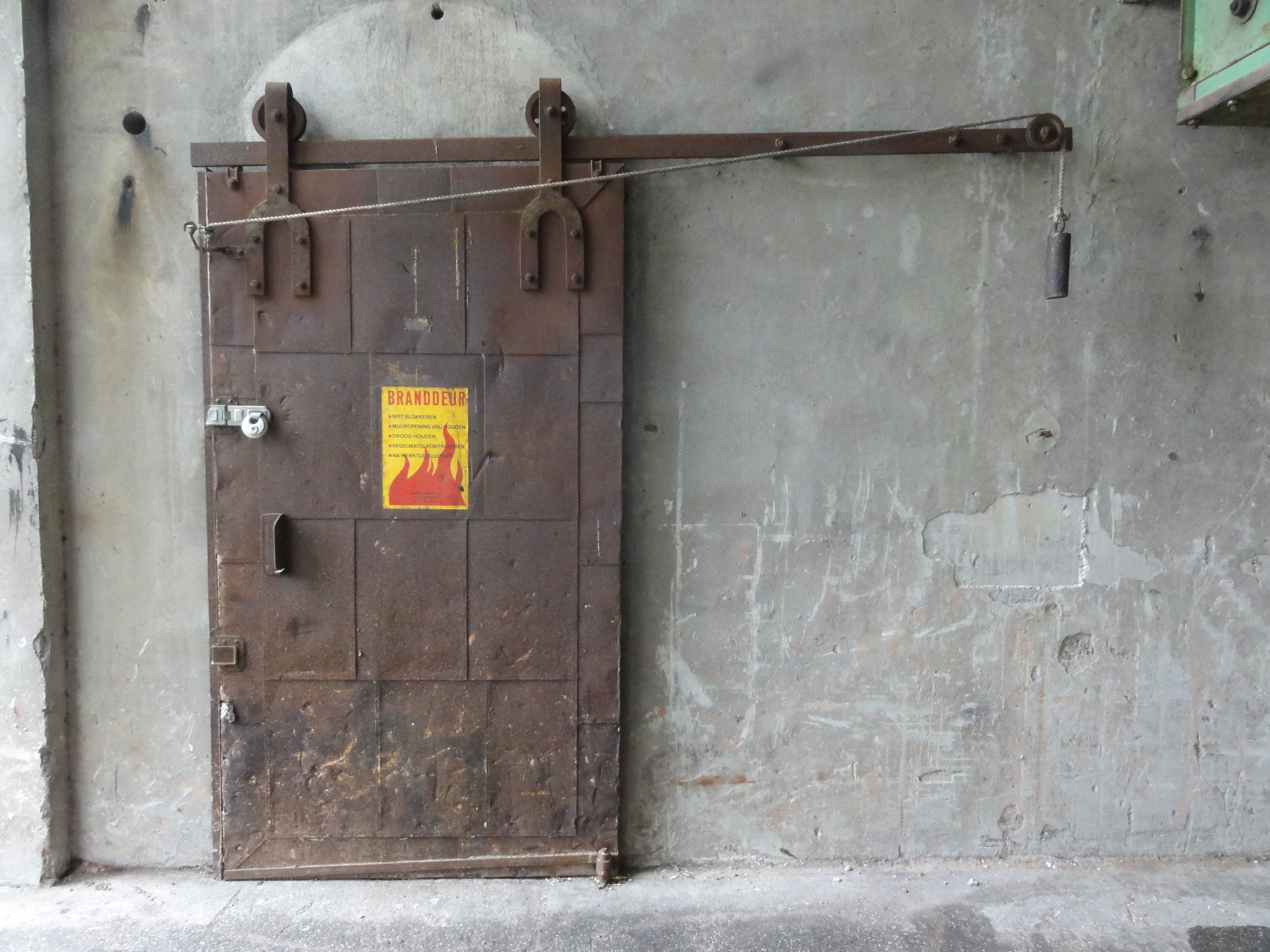 Branddeur in de voormalige meelfabriek in Leiden